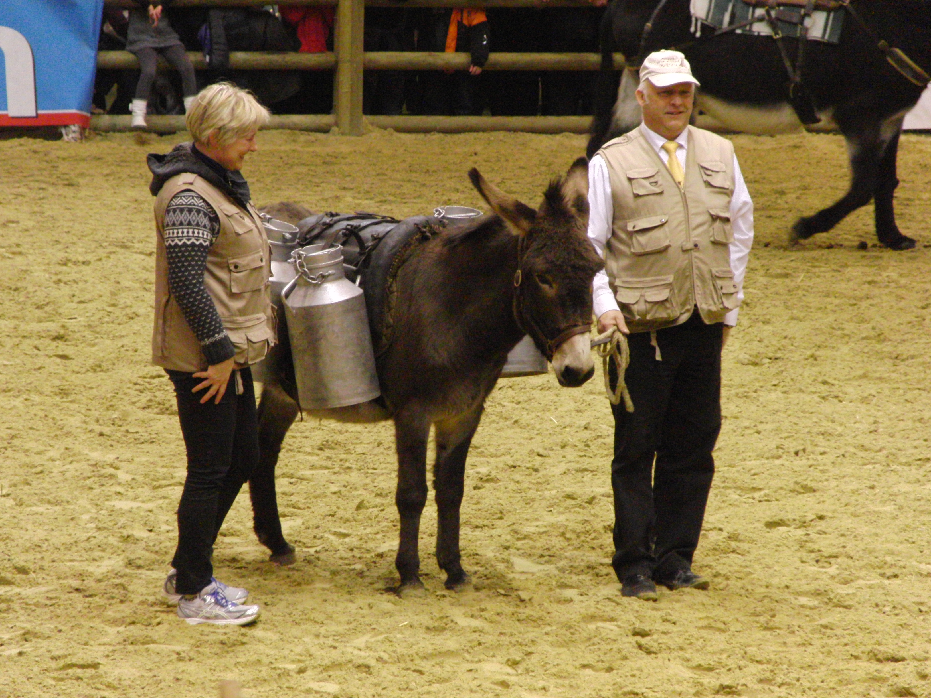 Présentation d'un âne normand bâté - Salon international de l'agriculture 2013, Paris, France